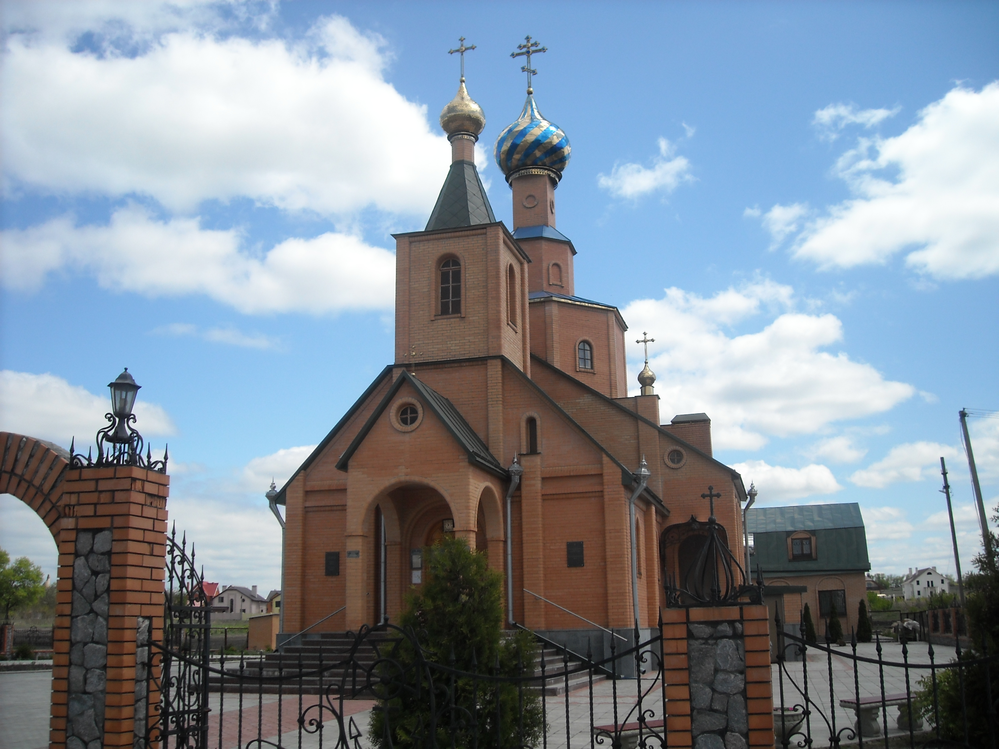 Україна. Харківська область.Харківський район.Циркуни. Храм святого Миколи. 2009